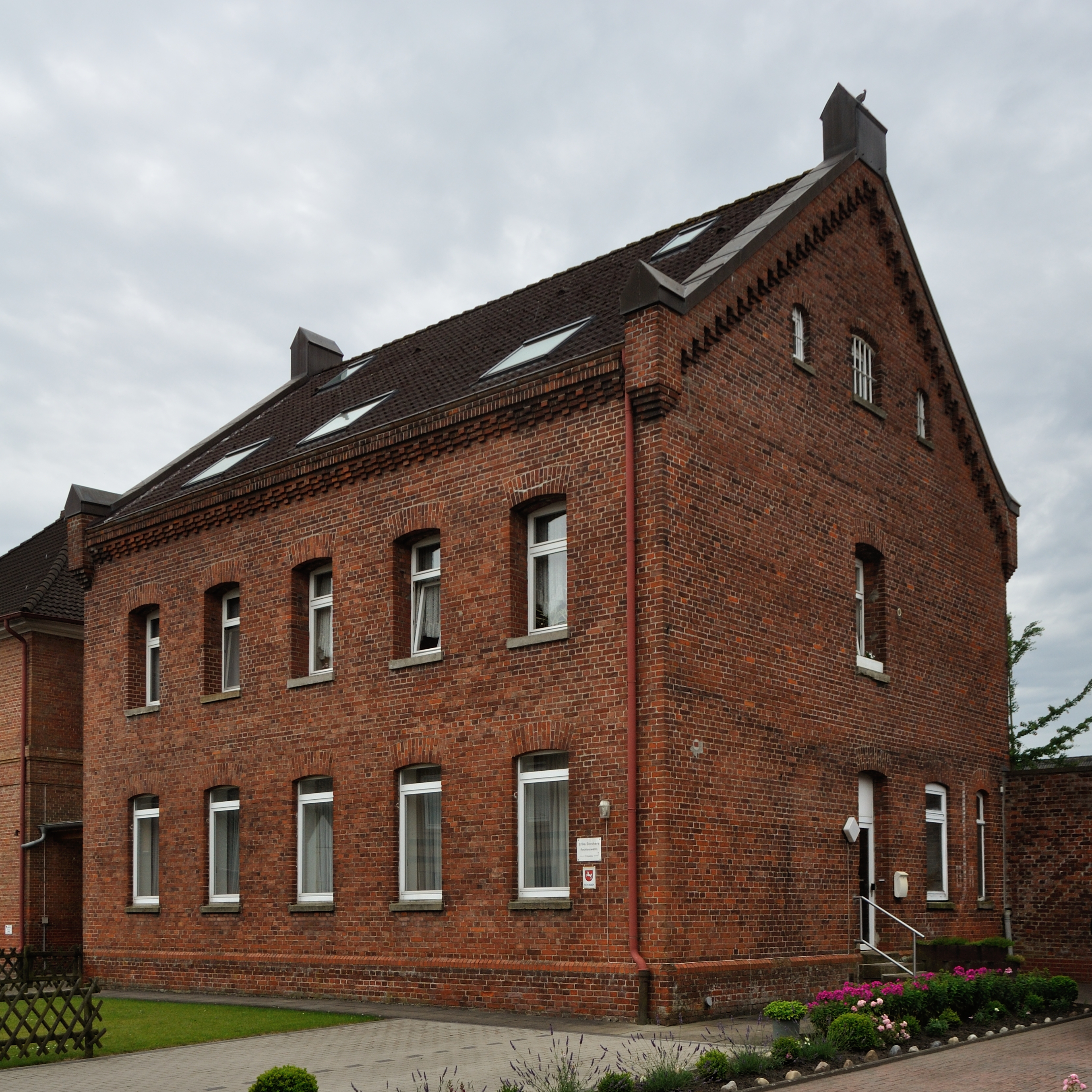 Ehemaliges Gefängnis Lange Straße 20a in Osten (Oste). This is a photograph of an architectural monument. .204.400.028